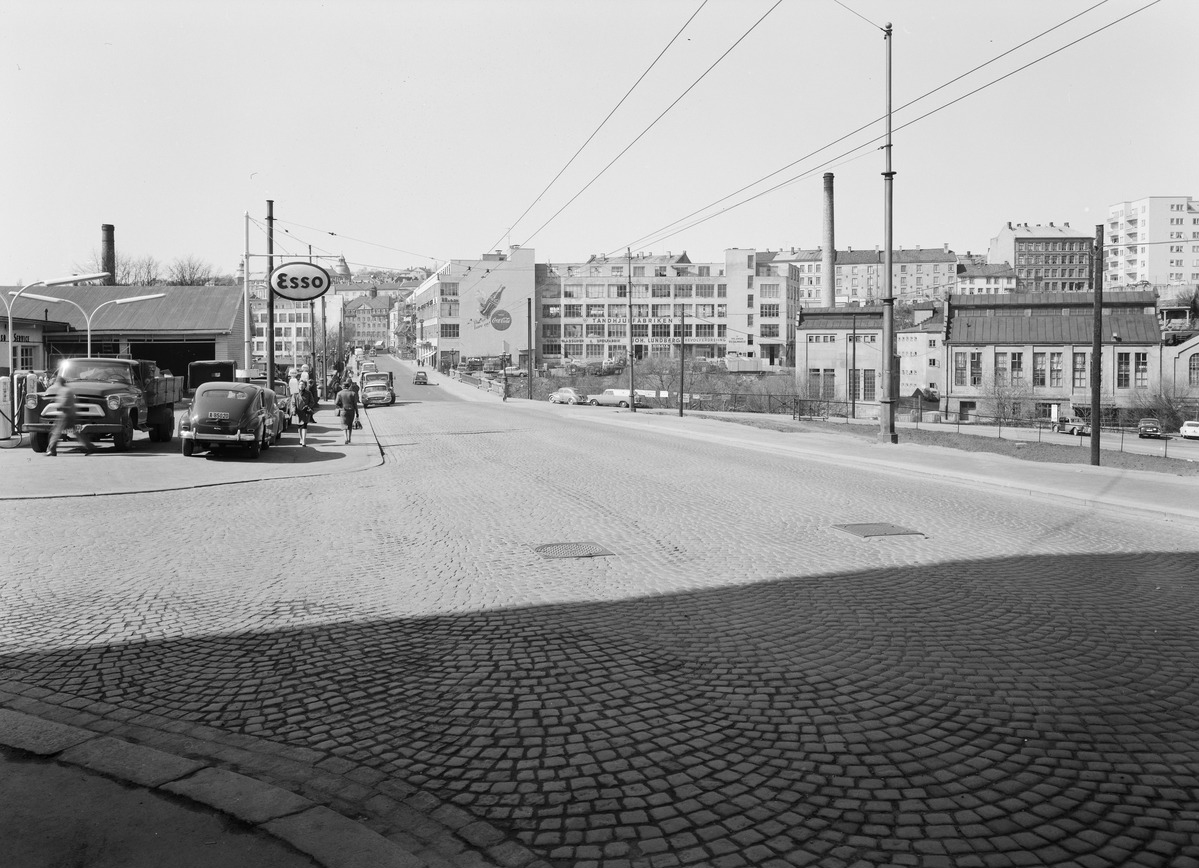 Sannergata mot Sannerbrua og Waldemar Thranes gate, 1961